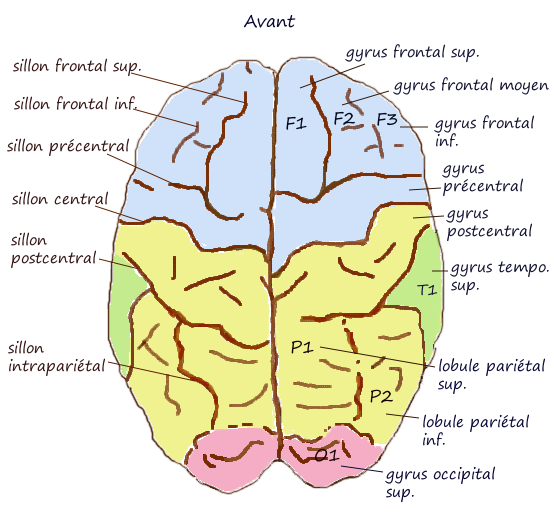 Face supérieure, sillons et gyri, dessin d'après une pièce anatomique